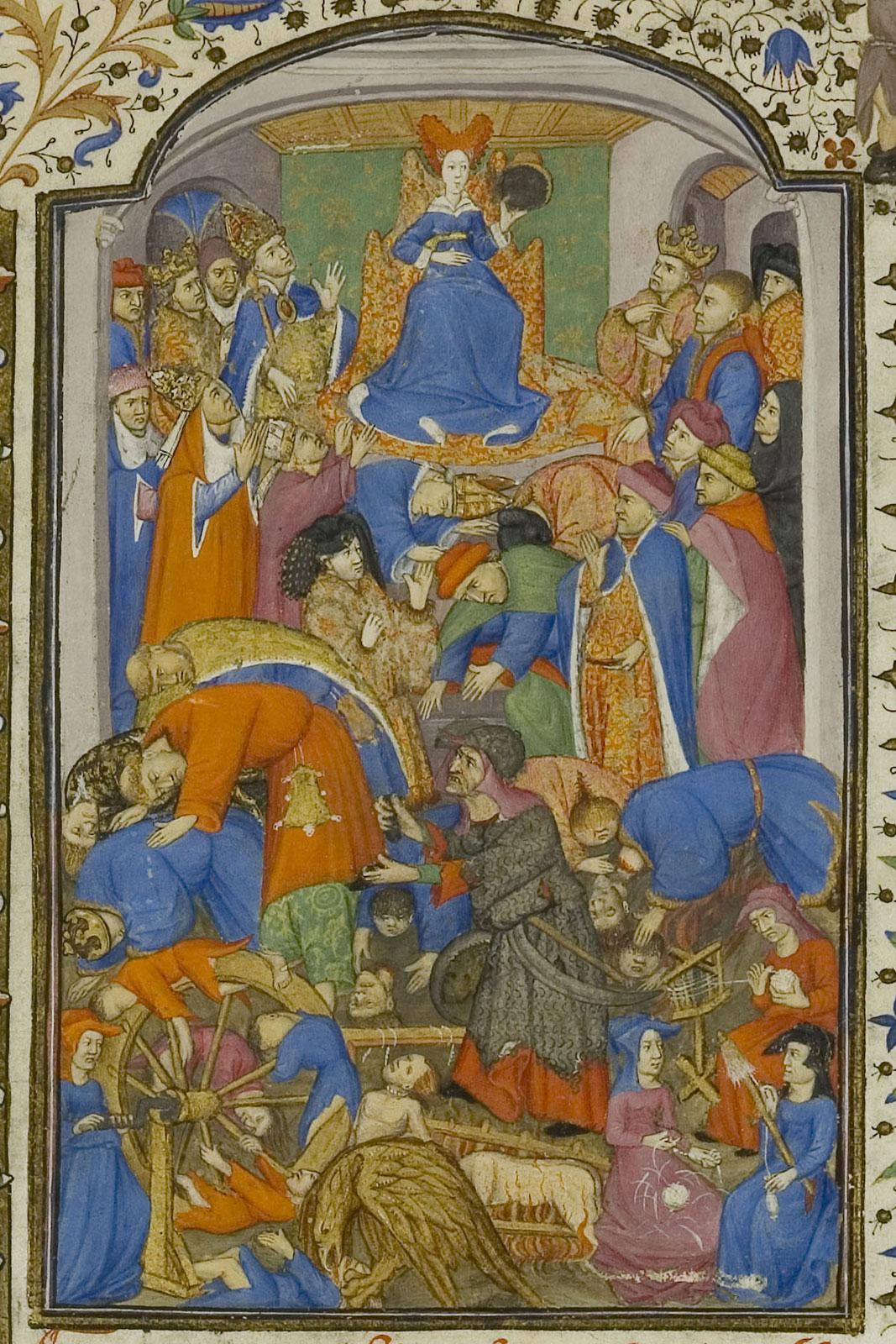 Miniature en frontispice d'un manuscrit de Boccace : Livre des cas des nobles hommes et femmes